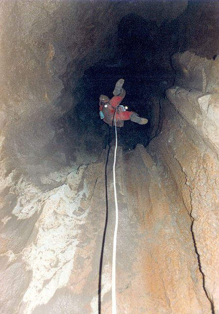 Priepasť Hlinoš na Dolnom vrchu v Slovenskom krase. Na zábere zostup do Bielej šachty (-60 m) počas výpravy jaskyniarov Slovenskej speleologickej spoločnosti v lete 1997, ktorá ako prvá dosiahla dno novoobjavenej jaskyne (-110 m). Iskrivo biely vykorodovaný wettersteinský vápenec je prekrytý recentnými povlakmi splavených hlinitých sedimentov. Dobre viditeľné sú nástenné žľaby korózneho pôvodu.